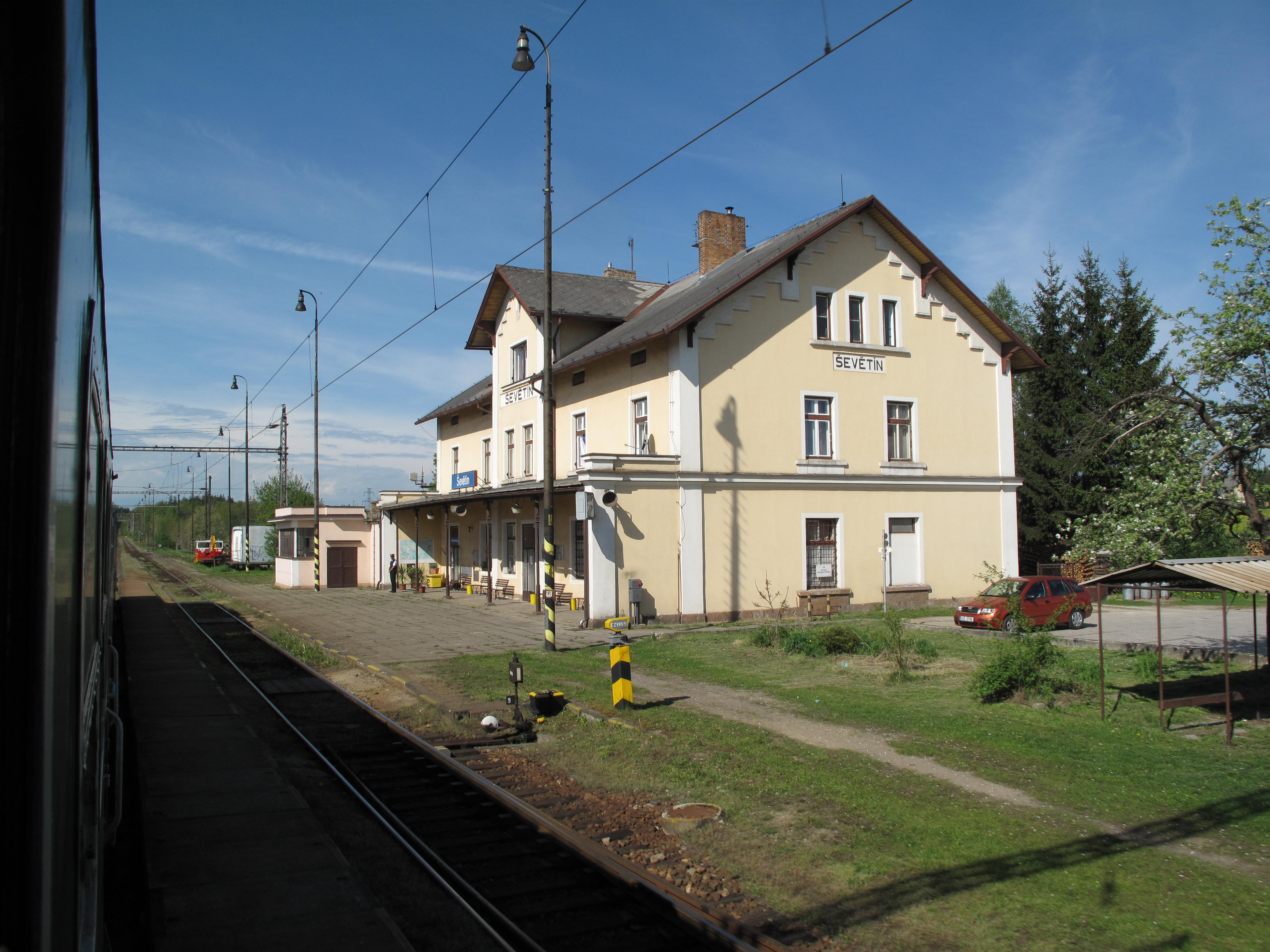 Ševětín, železniční stanice